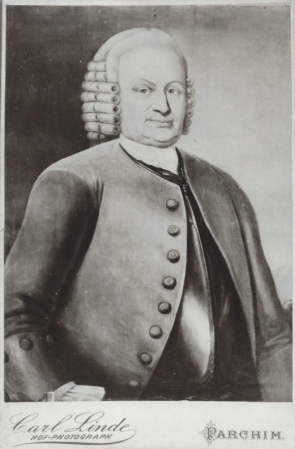 Fotografie eines Gemäldes von Jobst Hinrich von Bülow